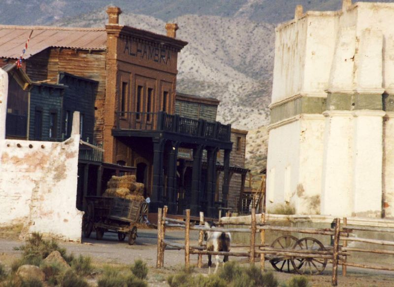 Décors du film Le Bon, la Brute et le Truand